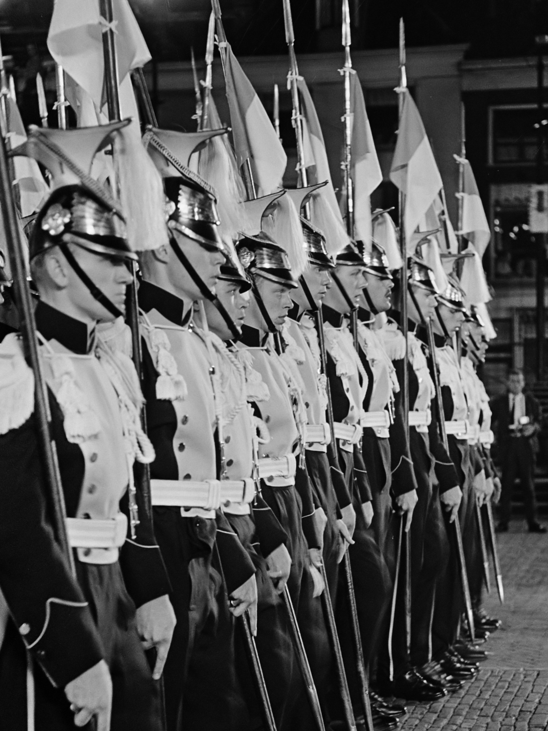 Taptoe Delft, lanciers tijdens stormaanval, overzicht 25 augustus 1964